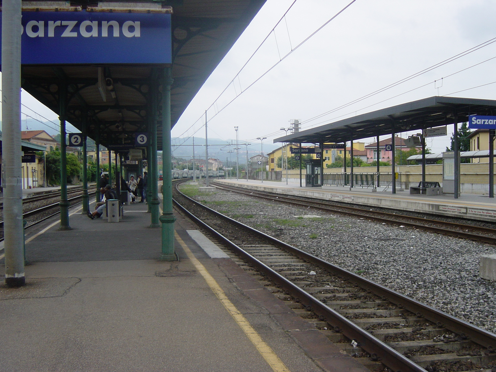 Stazione di Sarzana